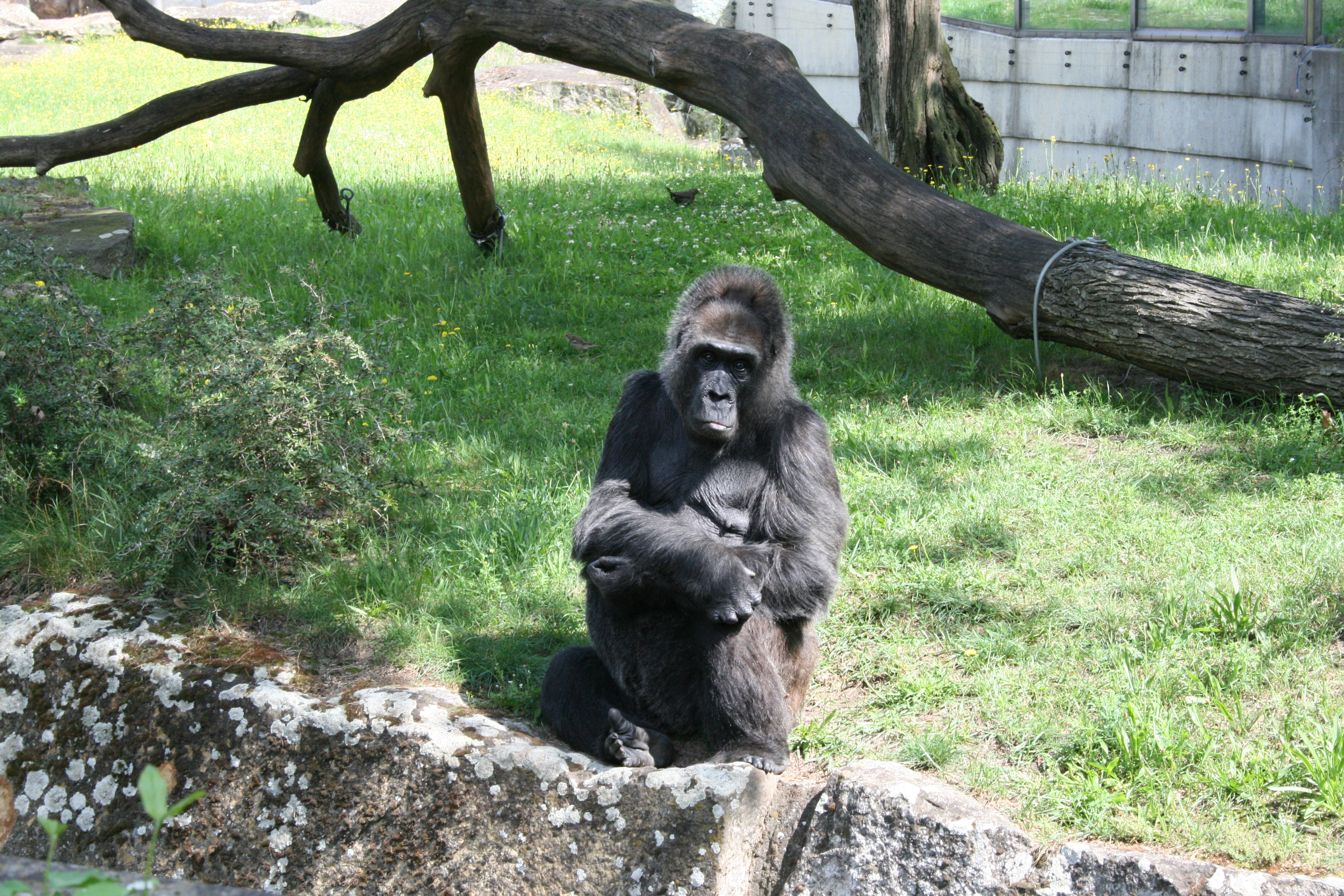 Animales en el zoo de Berlín